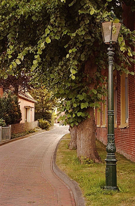 Ein Blick in die Tiefstraße, Larrelt (Stadtteil von Emden, Deutschland)